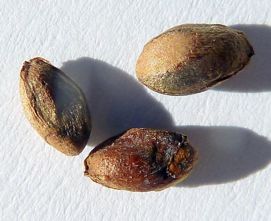 Platycladus orientalis (Árbol de la vida) - Semillas sueltas - Cultivado/ornamental, Madrid (España).